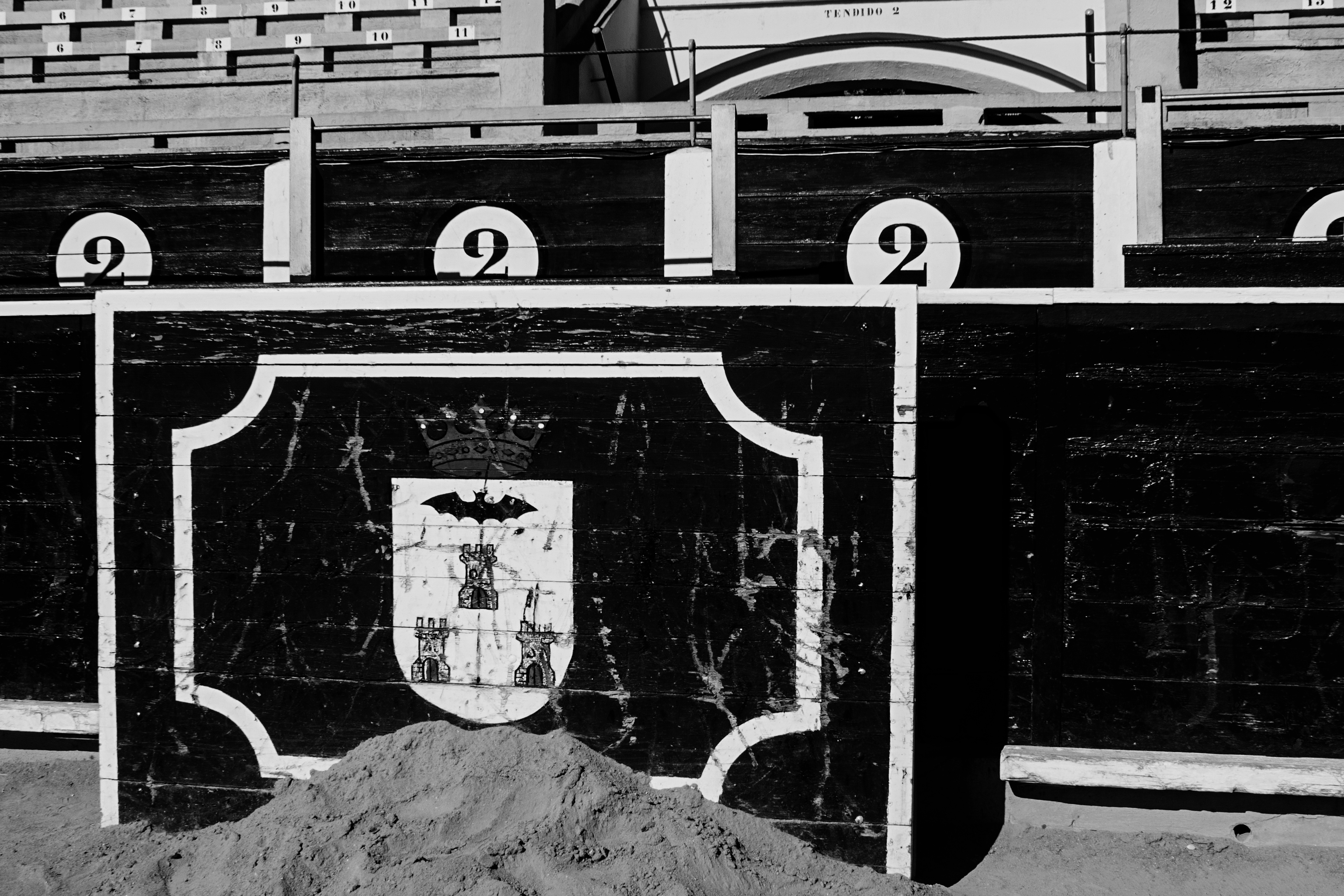 Toros Albacete Barrera